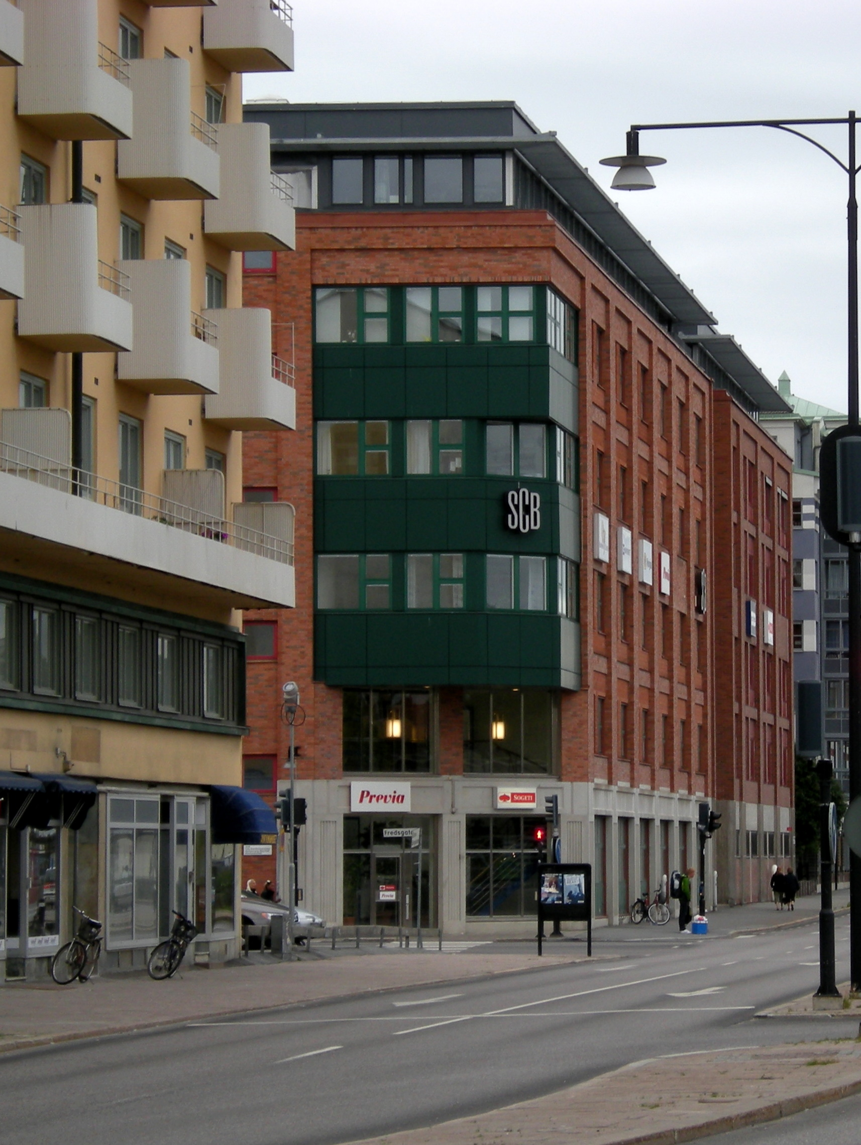 SCB:s byggnad i Örebor